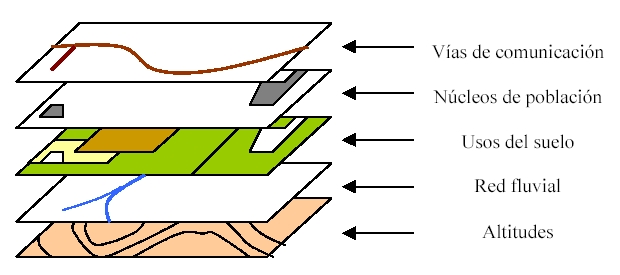 Organización de la información espacial en capas en un SIG. Autor: Corso (27 de julio de 2003). Tomada de: Enciclopedia Libre.